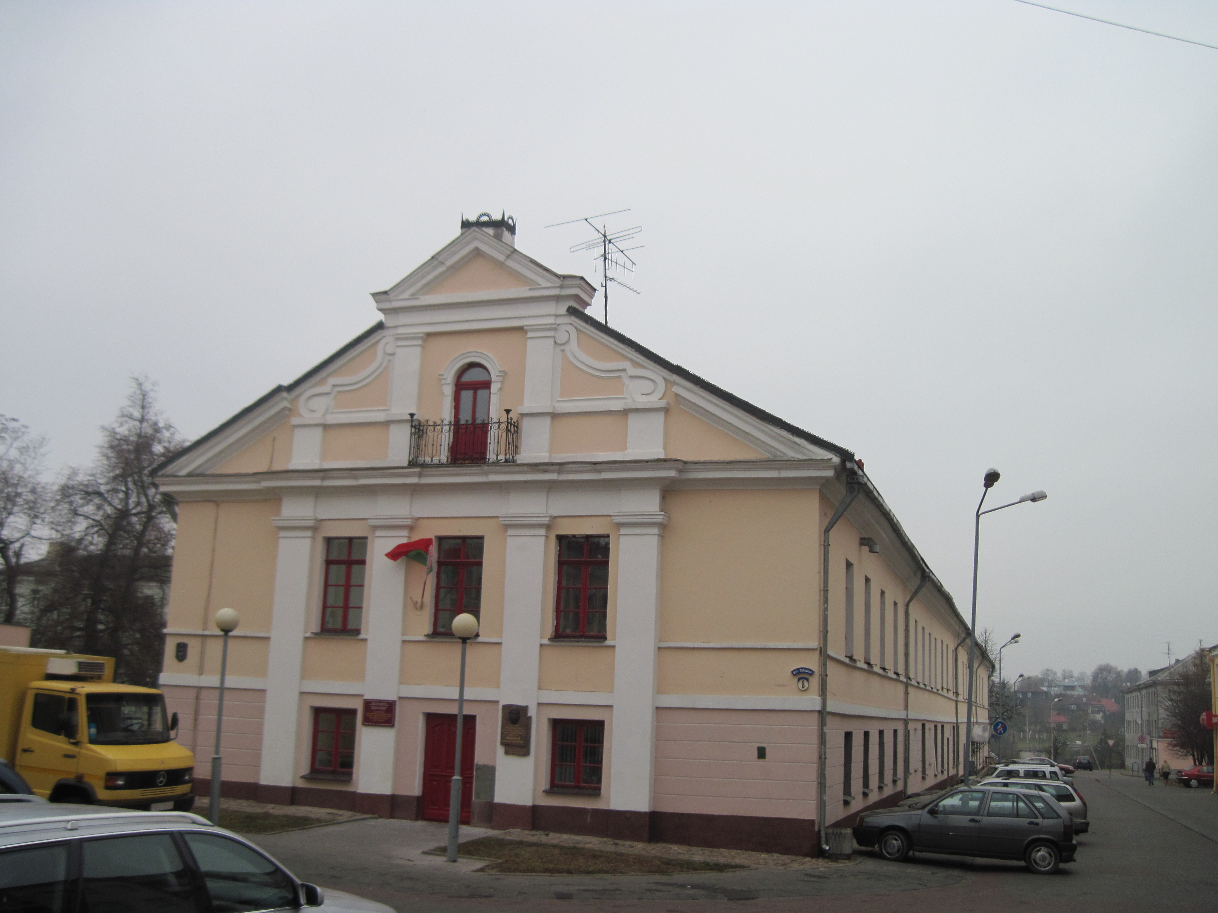 Беларуская (тарашкевіца): Будынак па вул. Савецкая, 8